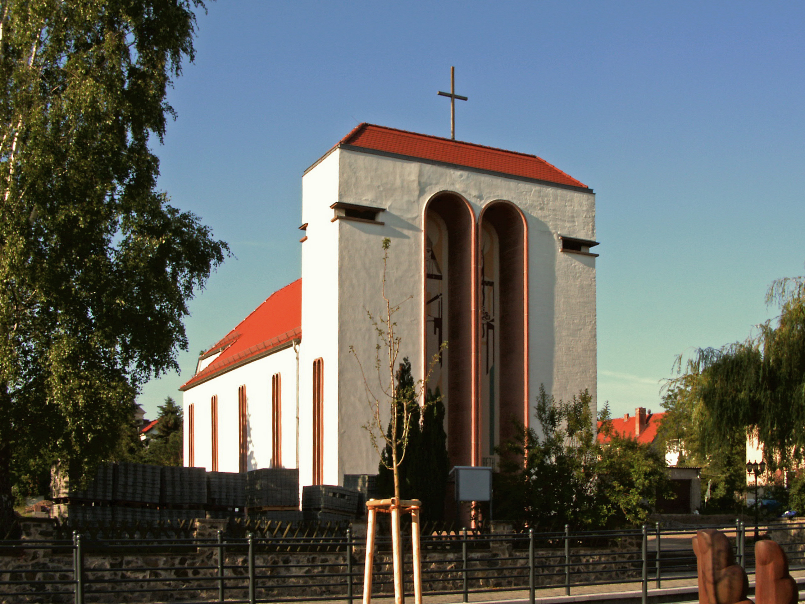 Katholische Kirche St. Elisabeth in Ballenstedt, Landkreis Harz